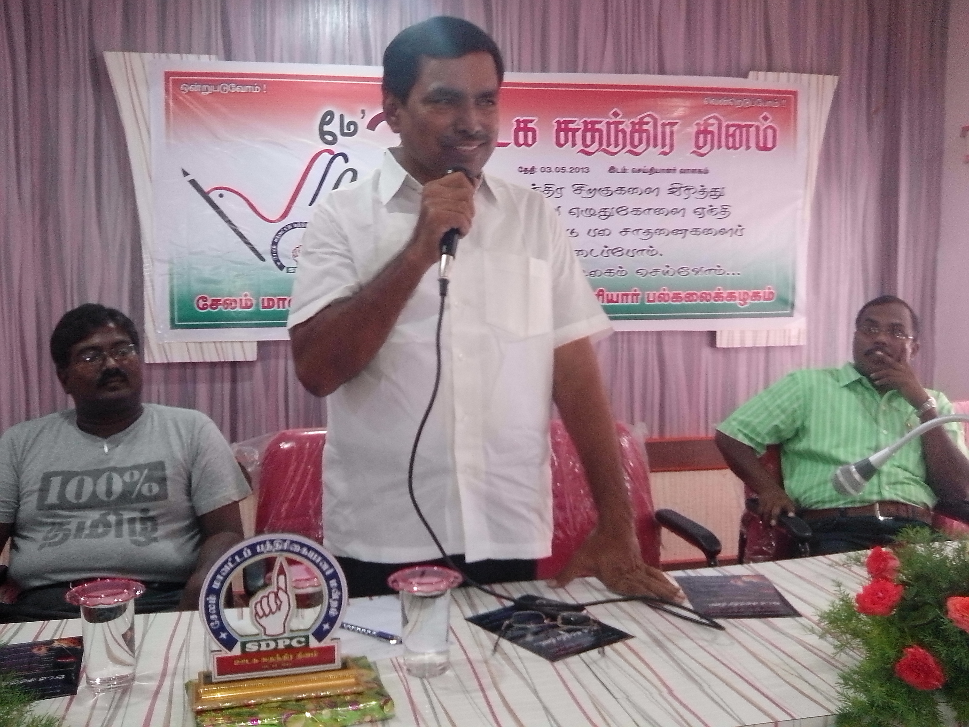 த. ஸ்டாலின் குணசேகரன் சேலத்தில் இதழியலாளர் மன்றத்தில் உரையாற்றுகின்றார்; உடன் முனைவர் தமிழ்ப்பரிதி மாரி (Dr. Thamizhpparithi Maari), முனைவர் இரா. சுப்பிரமணி (Dr. R. Subramani)